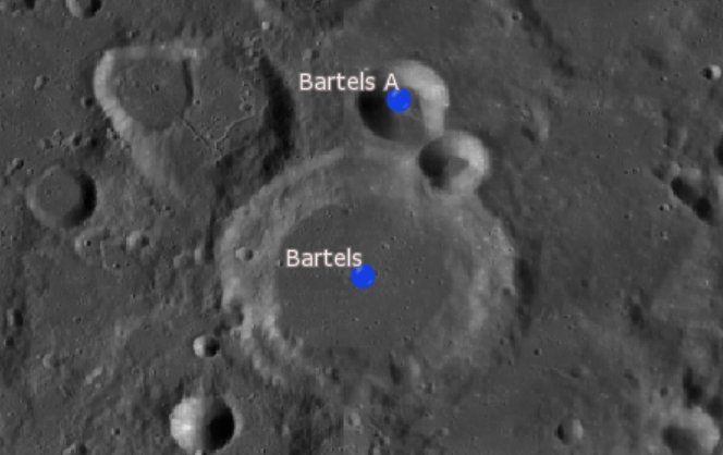 Cráter lunar Bartels. Cráteres satélite. (Imagen LRO)